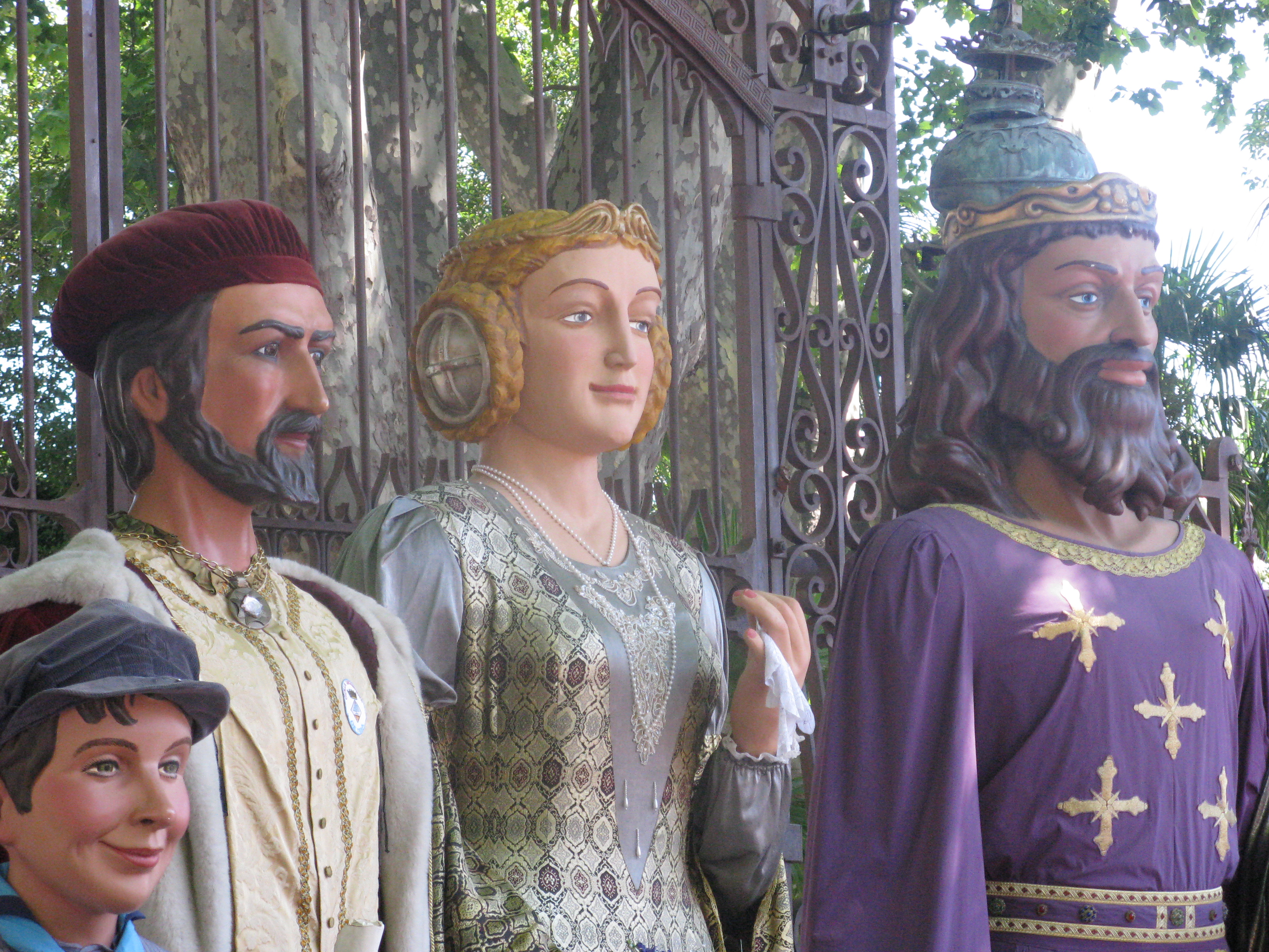 Défilé des Gegants devant le Parc Bombes à la Féria de Millas